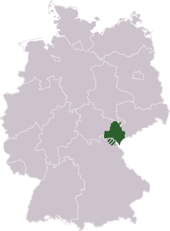 Lage des Vogtlandes in Deutschland